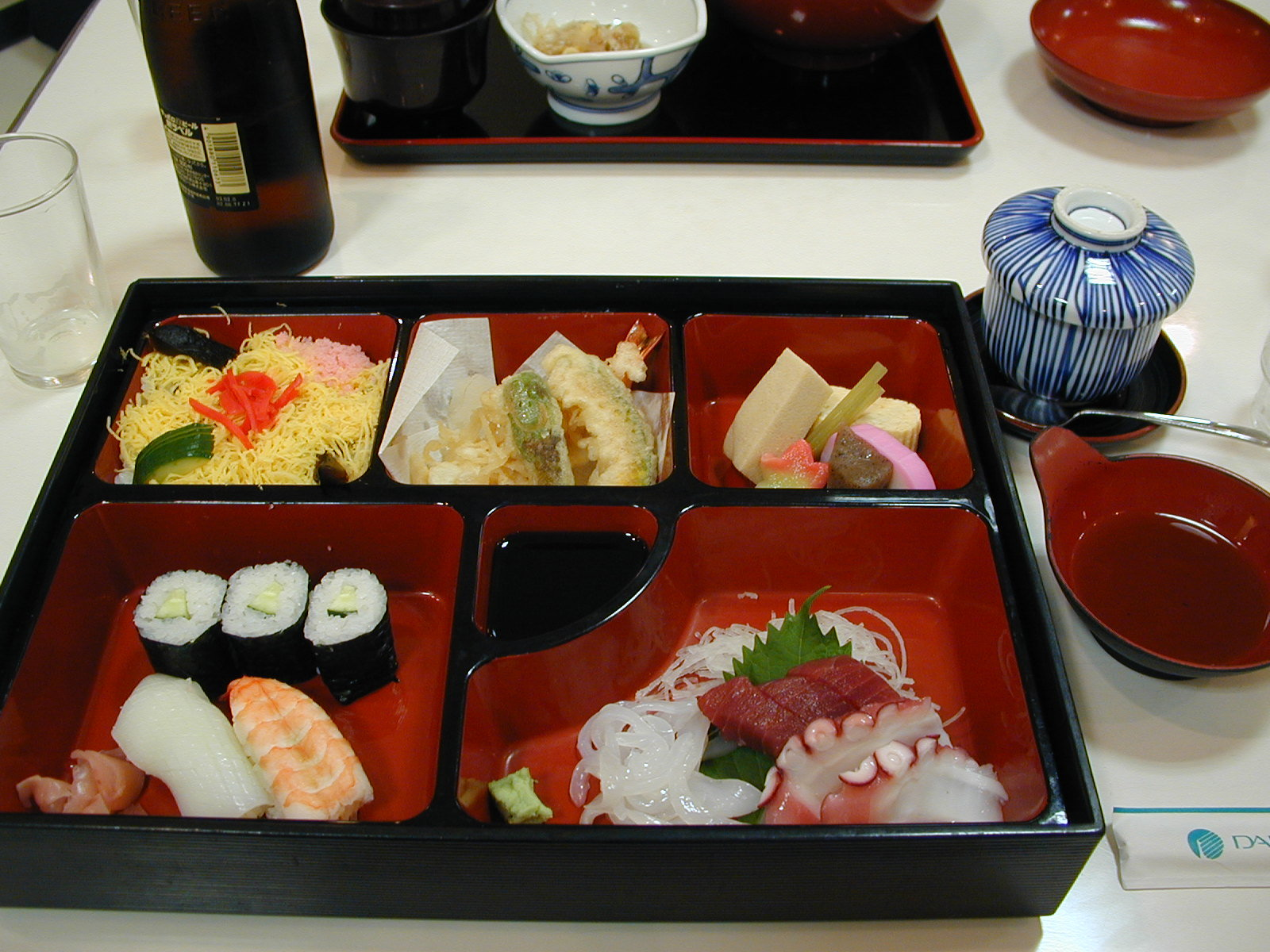 Bento (Cucina giapponese) La foto è stata scattata da me a Kyoto nell'agosto 2002